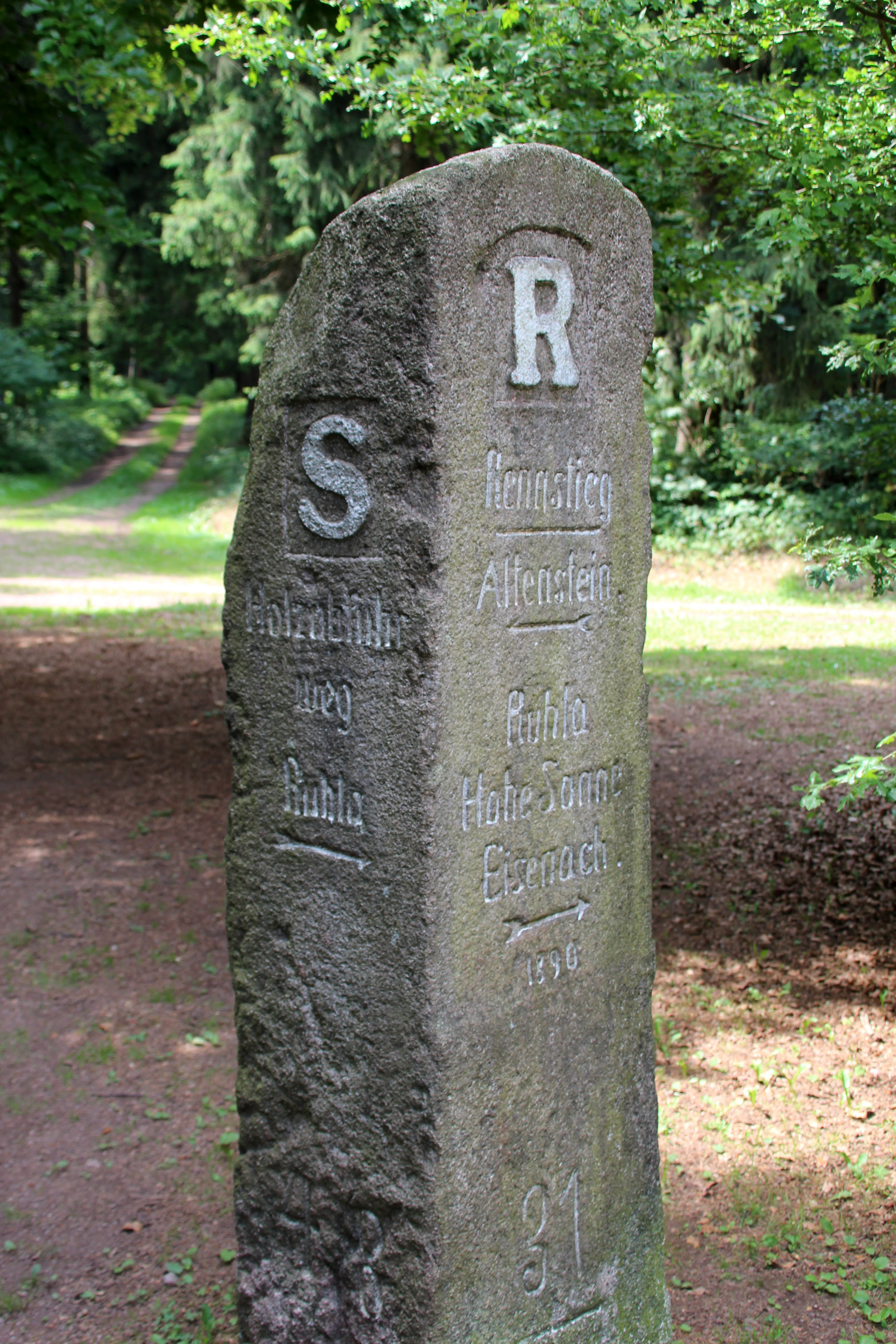 Obelisk am "Ruhlaer Häuschen" nahe Ruhla. Er markiert den Verlauf des "Rennsteigs" (hier am km 14) und den Beginn des von diesem Punkt abgehenden "Sallmannshäuser Rennsteigs".